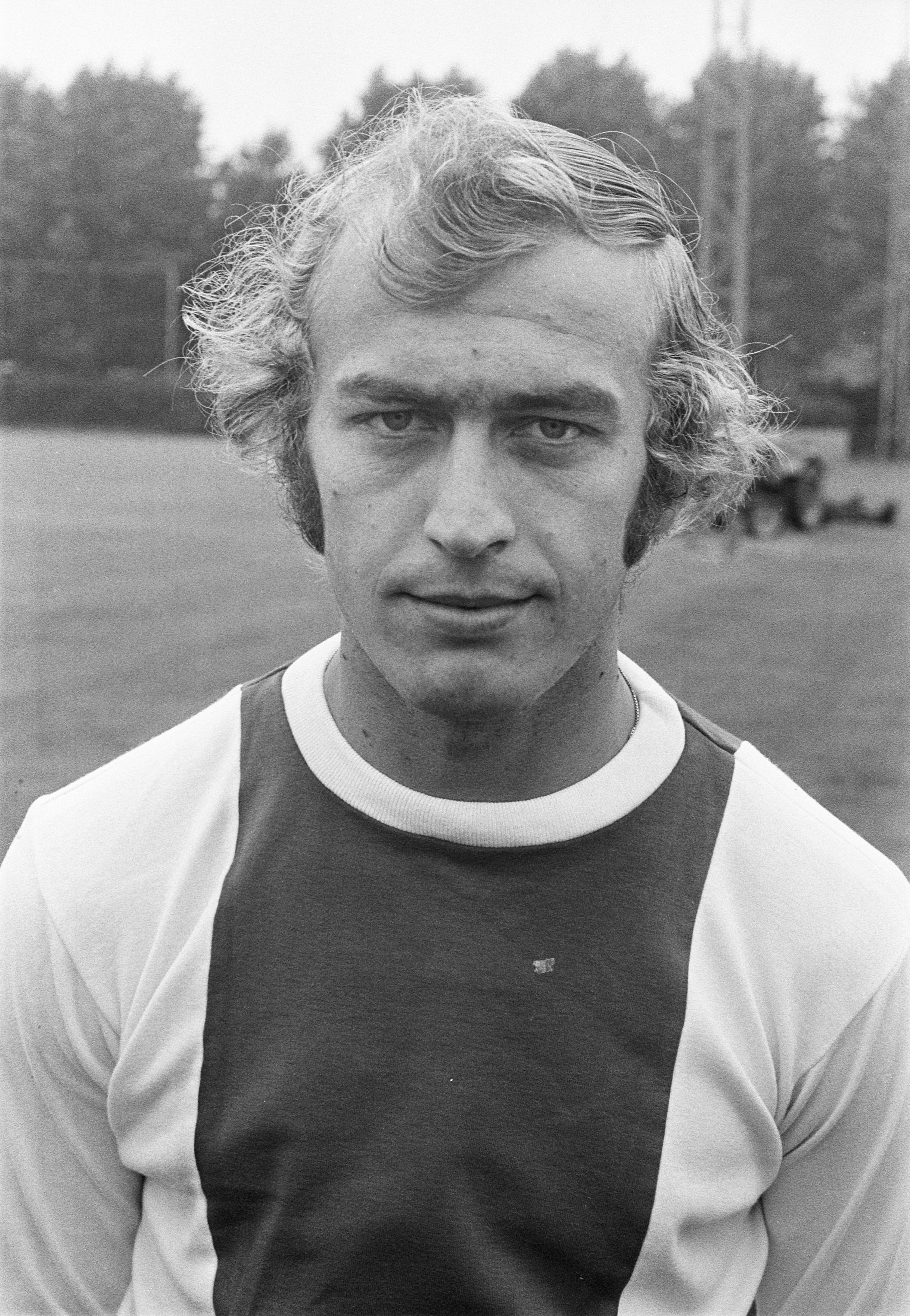 Collectie / Archief : Fotocollectie Anefo Reportage / Serie : [ onbekend ] Beschrijving : Ajax-selectie presenteert zich aan de pers, nummer 9 Horst Blankenburg , nummer 10 trainer Kovacs, nummer 11 Arie Haan , nummer 12 Johan Cruijff (allen koppen) / Datum : 17 juli 1972 Trefwoorden : sport, voetbal Persoonsnaam : Cruijff, Johan, Haan, Arie Fotograaf : Verhoeff, Bert / Anefo Auteursrechthebbende : Nationaal Archief Materiaalsoort : Negatief (zwart/wit) Nummer archiefinventaris : bekijk toegang 2.24.01.05 Bestanddeelnummer : 925-7441